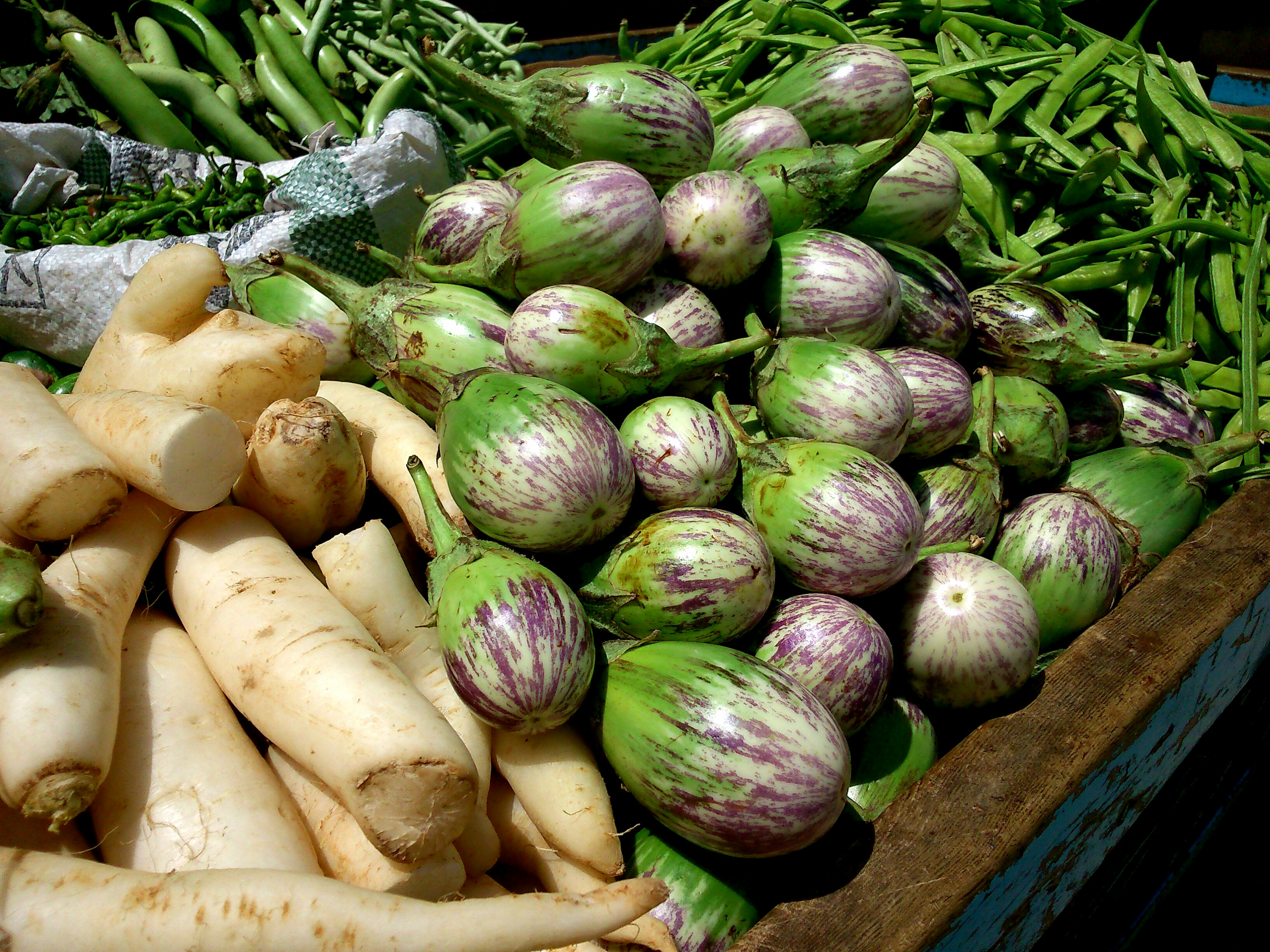 Junge asiatische Auberginen und weiteres Gemüse an einem Straßenstand in Südindien.